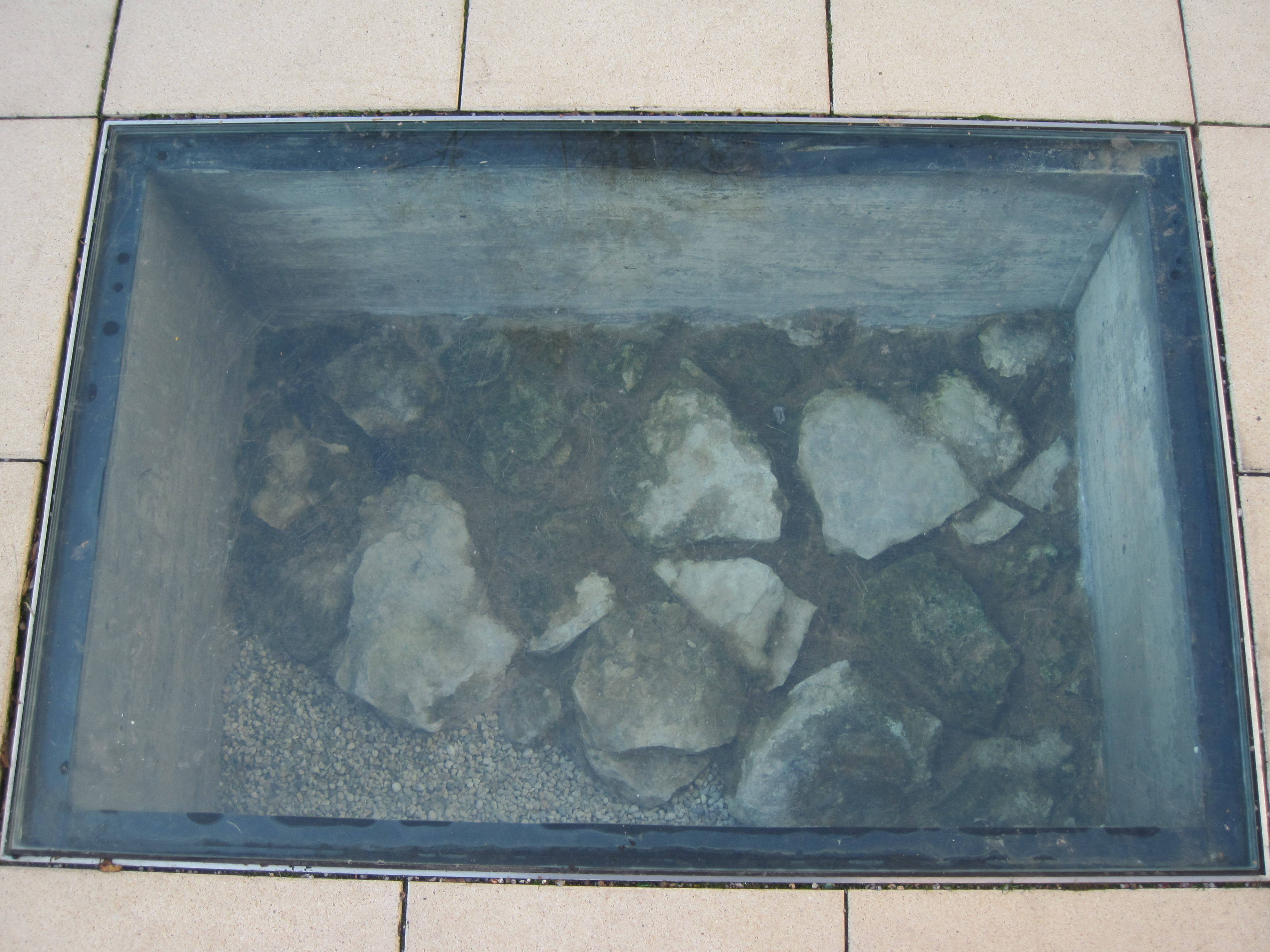 Das Foto zeigt die steinernen Überreste eines alten Burgmannshofs zur Stadtburg Hamm auf dem Gelände des ehemaligen Franziskanerklosters Hamm, unter Glas ausgestellt auf dem Vorplatz zur alten Klosterkirche und heutigen Pfarrkirche St. Agnes.